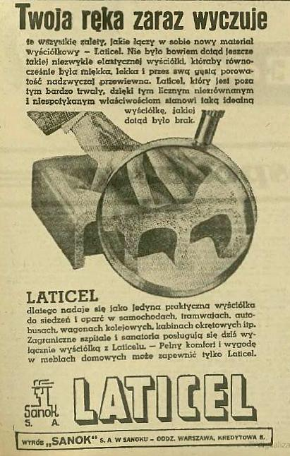 Ogłoszenie reklamowe Laticelu "Sanok Polska Spółka dla Przemysłu Gumowego" w 1939.